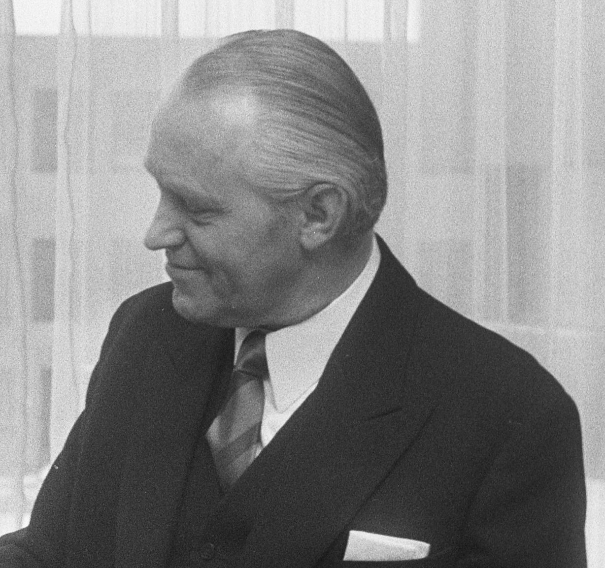 Van der Lee wordt gefeliciteerd door de heer Van der Harten, de nieuwe Commissaris der Koningin in Noord-Brabant